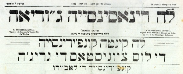 Главата на вестник "Ренесанса Джудеа".